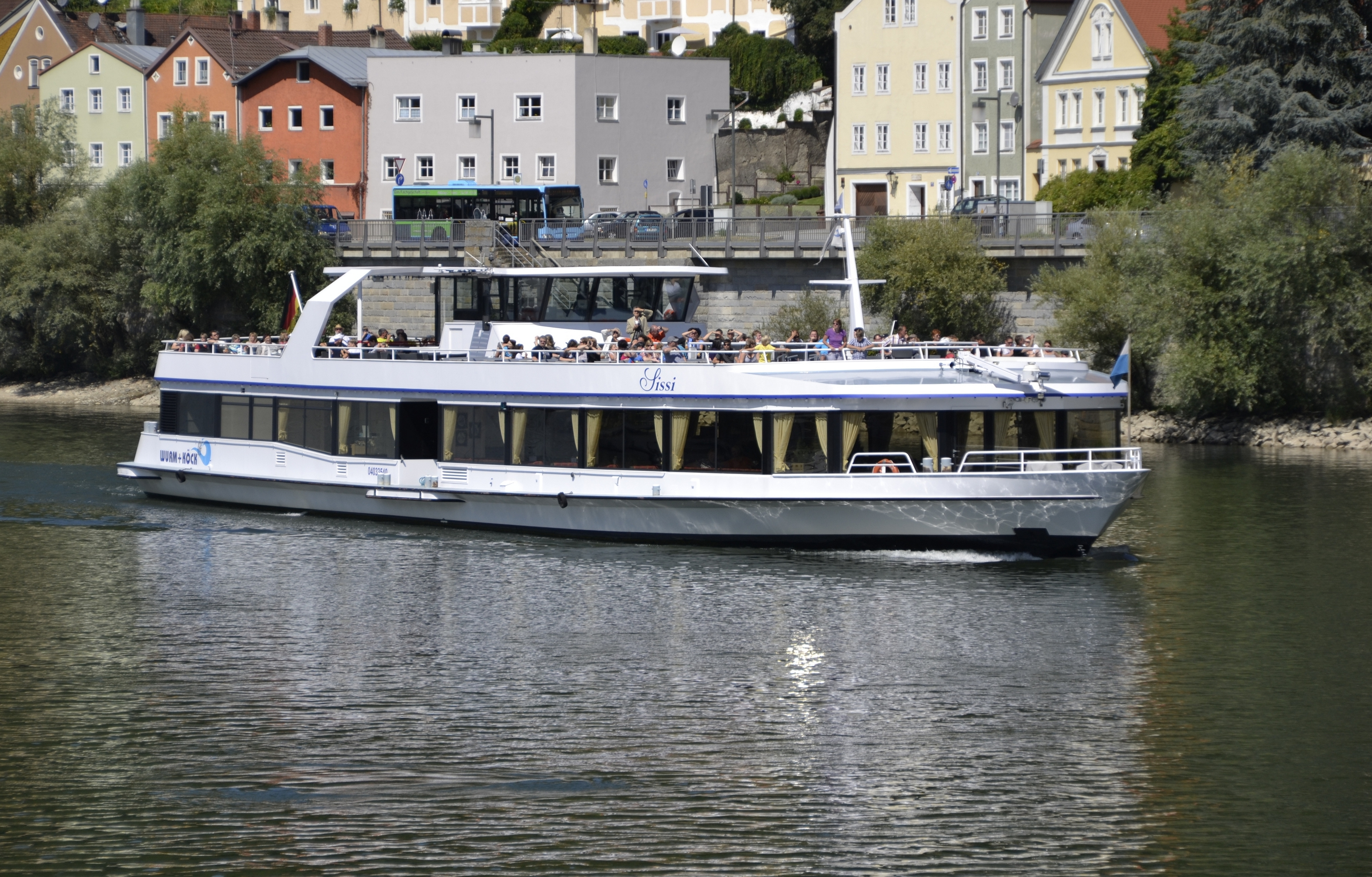 Schiff Sissi auf der Donau in Passau.